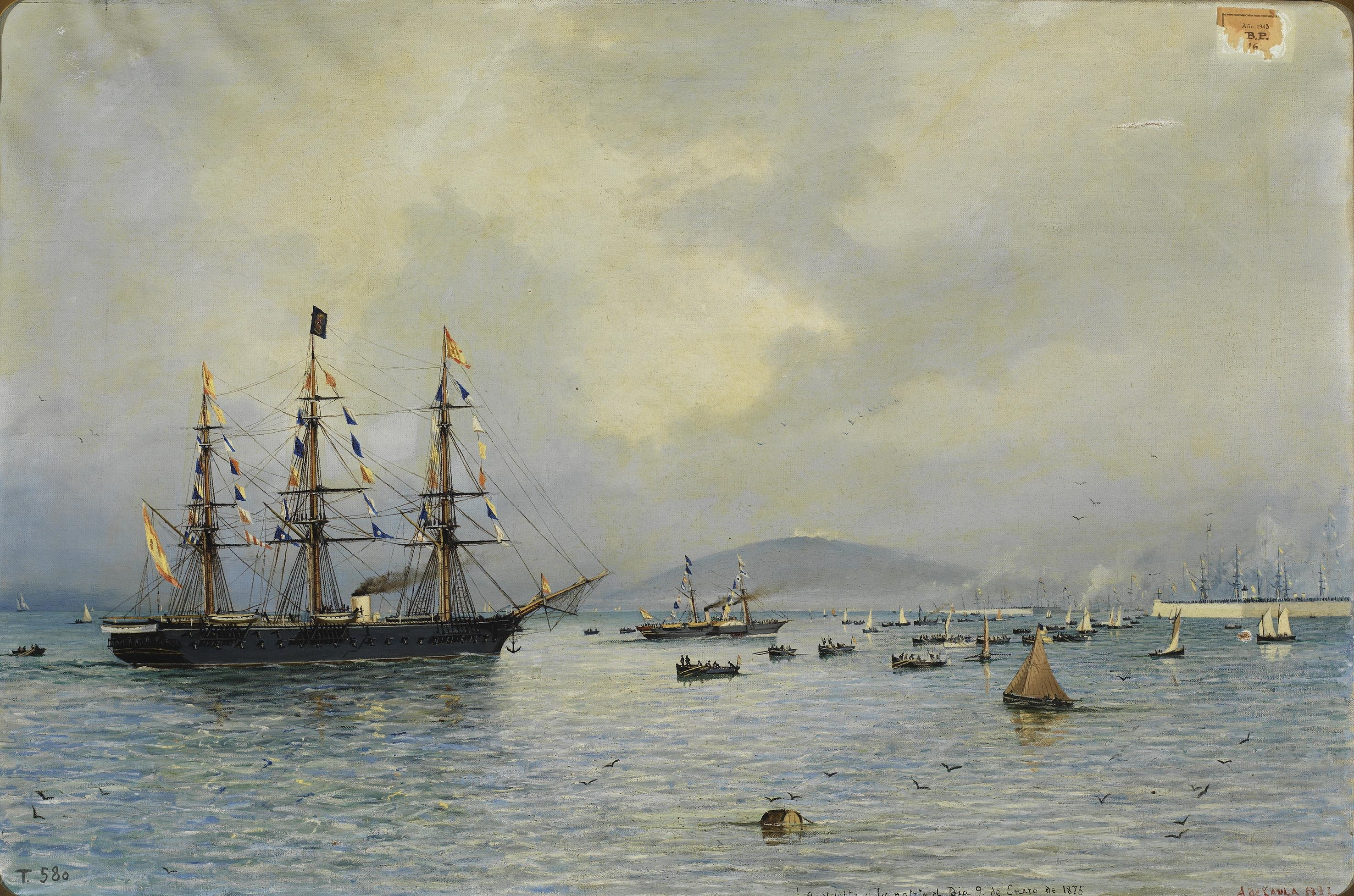 La obra representa a la fragata española Navas de Tolosa entrando en el puerto de Barcelona, procedente de Marsella, y con el rey Alfonso XII de España (1857-1885) a bordo, cuyo reinado había comenzado tras el pronunciamiento militar del general Arsenio Martínez Campos en Sagunto en diciembre de 1874.